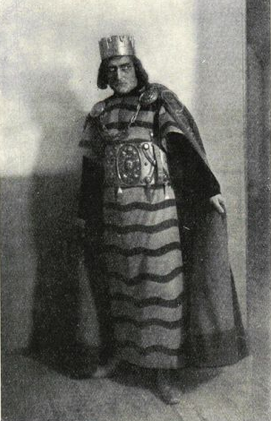 Carl Richter som Macbeth.